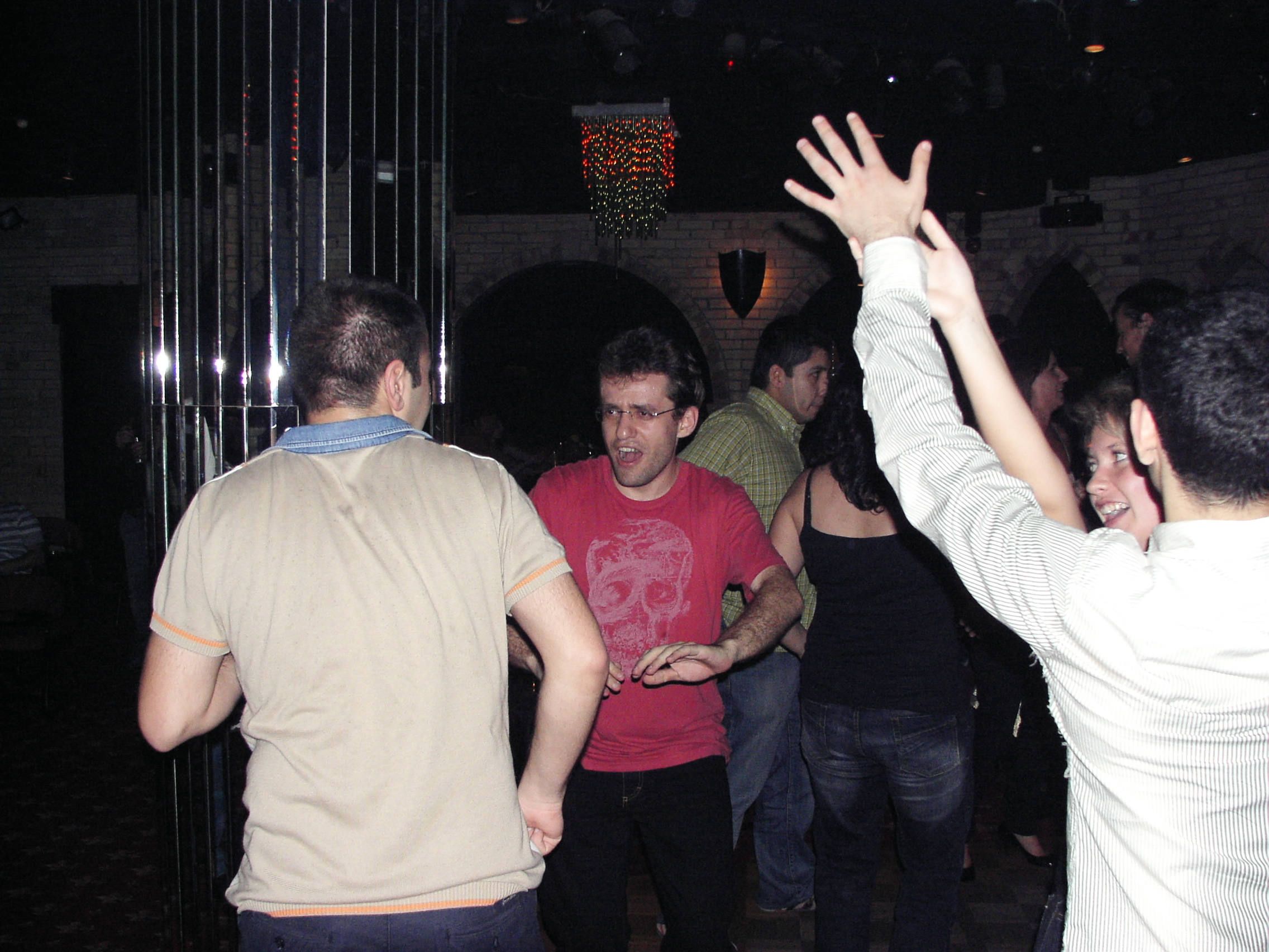 Azerbaijani GM Shakhriyar Mamedyarov and Armenian GM Levon Aronian dancing, EuroChess 2007.